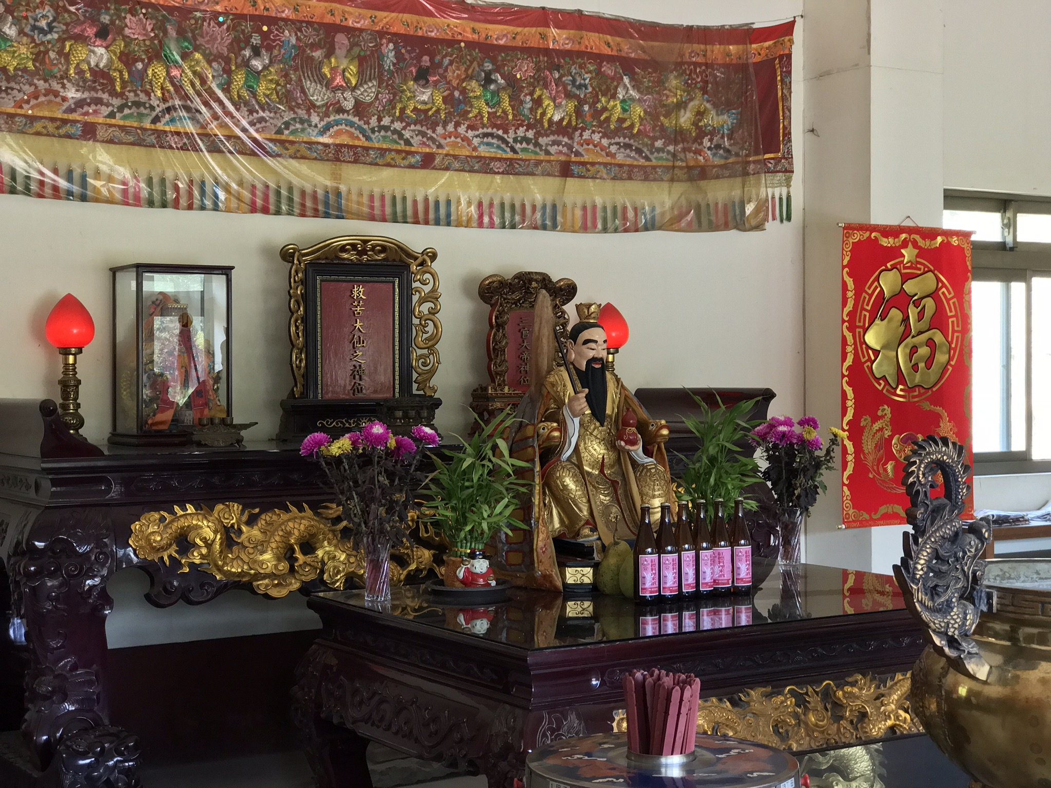 中文（台灣）: 大壢老仙爺廟神像